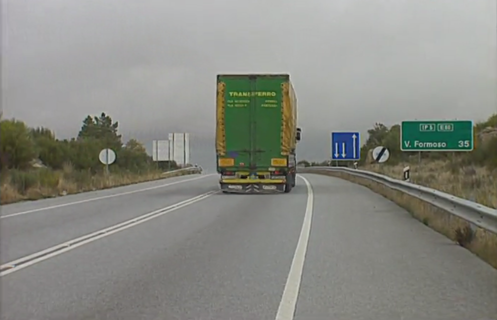 Antigo IP5 à saída da Guarda